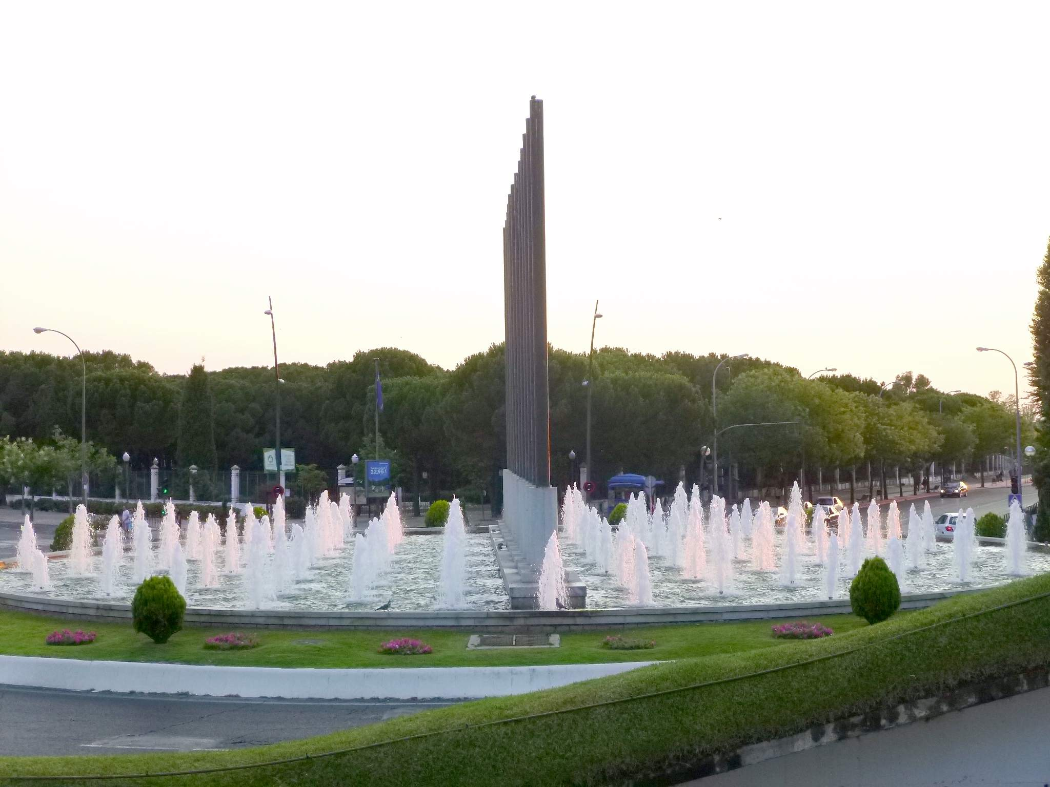 Fuente en Móstoles